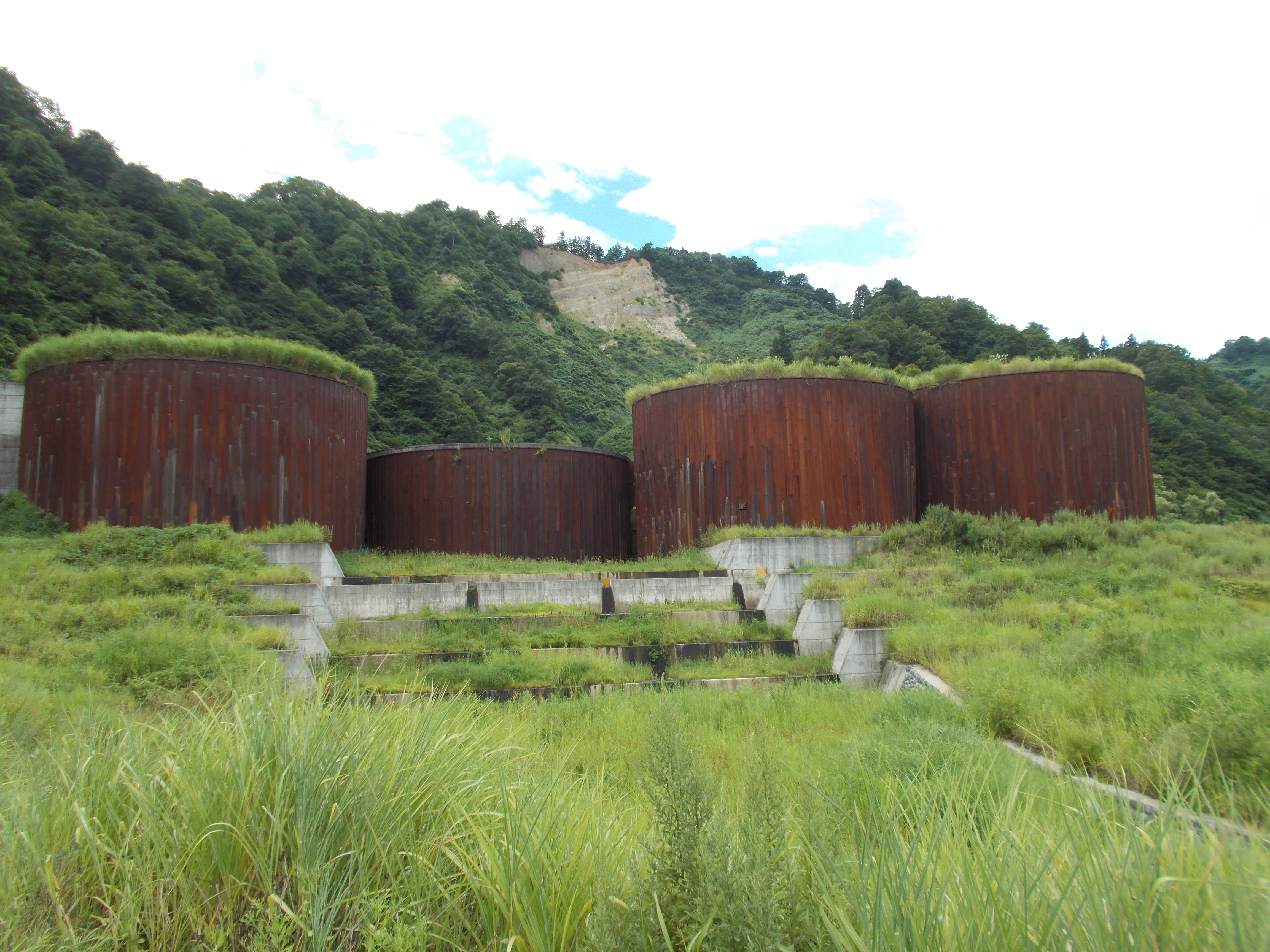 セルダムの例：トヤ沢砂防堰堤（鋼板セルダム）